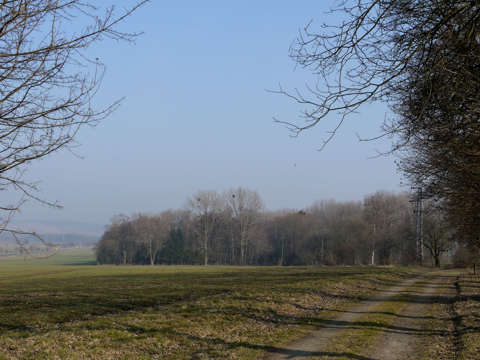 Schachtanlage Anna bei Alt-Wallmoden: Blick von der Bundesstraße 248 auf das ehemalige Schachtgelände